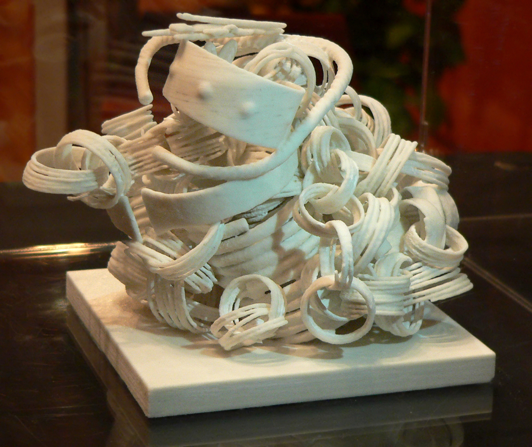 3 D Modell vom Goldhort Gessel in der Fundsituation, präsentiert bei öffentlicher Informationsveranstaltung in Syke